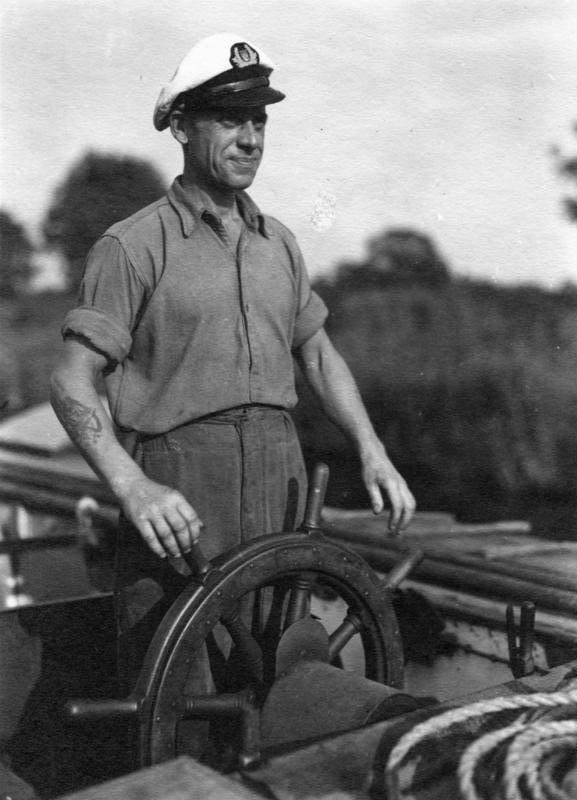 Illus-Bittner Auf dem Wasserwege nach Magdeburg. 1.7.47 Vortext siehe R66979 U.B.z.: Der Kapitän muss das Steuer gut handhaben können, denn immer wieder hat er das Schiff durch die Trümmer zerstörter Brücken hindurchzulavieren. 627-47